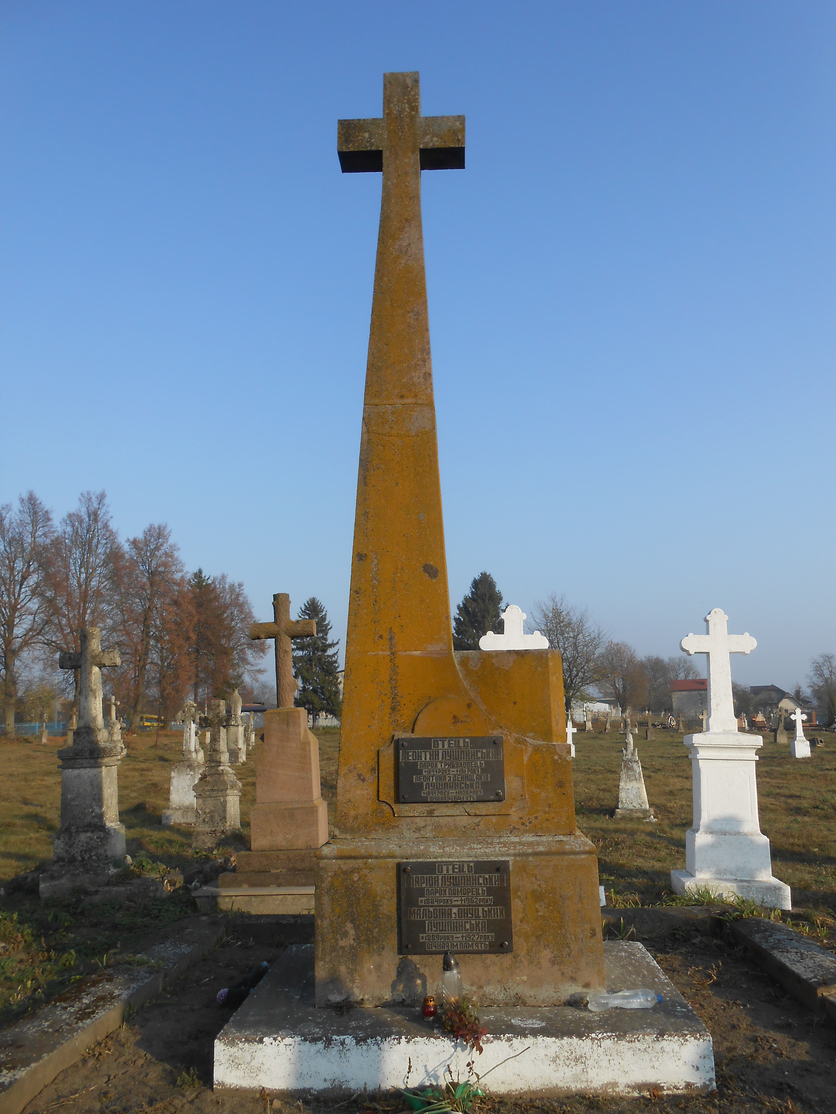 Надгробок о. Леонтія Лушпинського, о. Іляріона Лушпинського, їхніх дружин